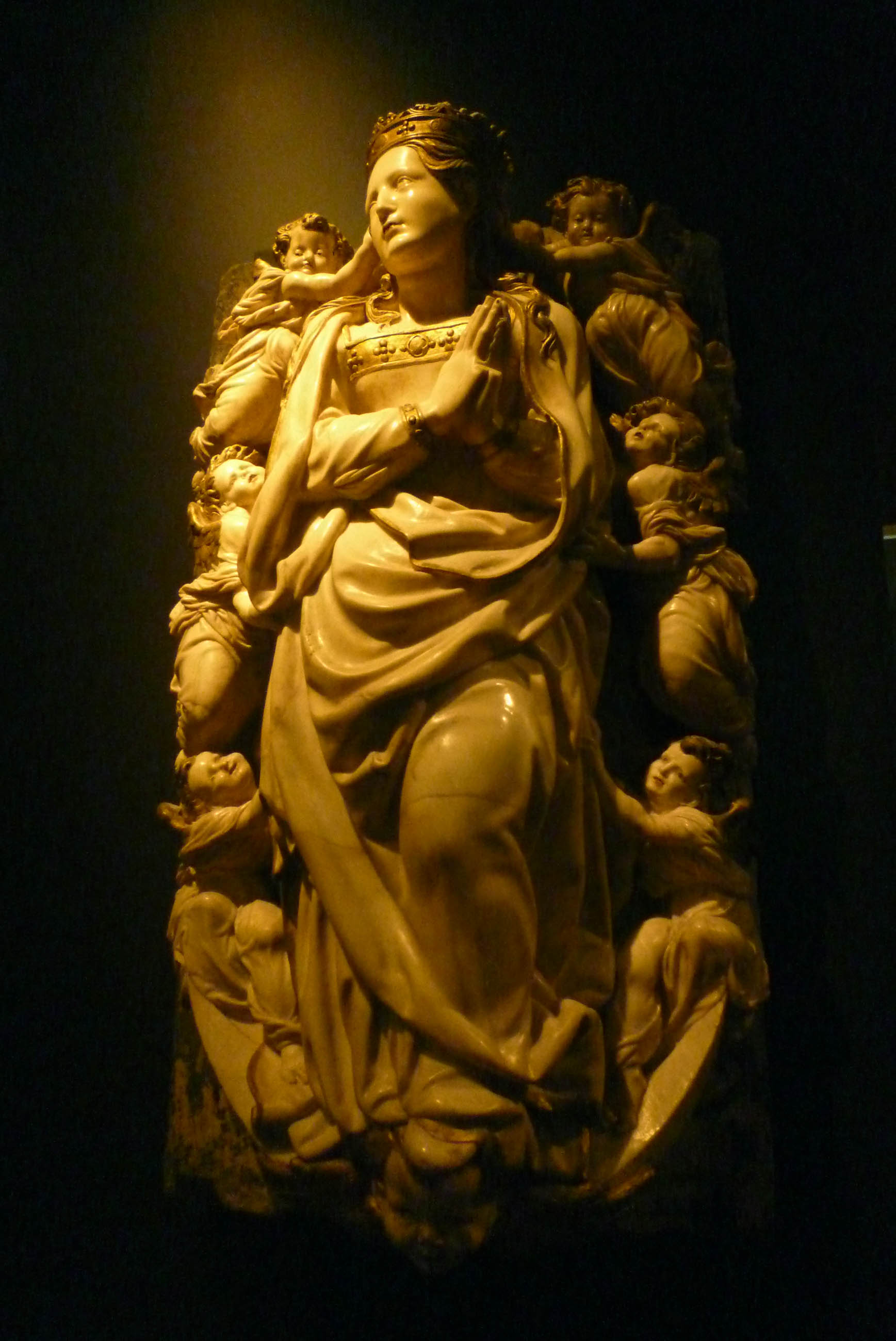 Nuestra Señora de la Asunción. Obra de Gregorio Bigarny (también conocido como Gregorio Pardo), hijo del escultor Felipe Bigarny. Procede del desaparecido convento de Santo Domingo el Real de Madrid. Actualmente en el Museo Arqueológico Nacional de Madrid.